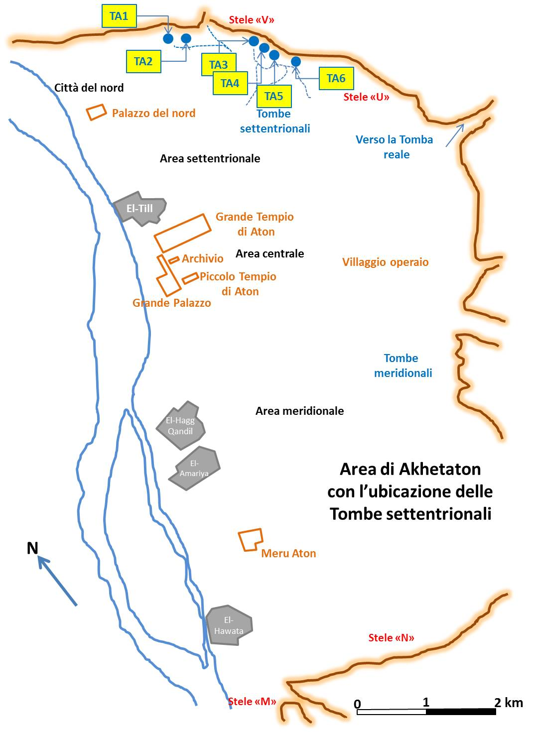 Planimetria schematica dell'area di Amarna con ubicazione delle tombe settentrionali